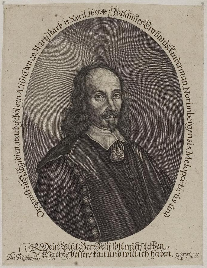 Grafik aus dem Klebeband Nr. 3 der Fürstlich Waldeckschen Hofbibliothek Arolsen Motiv: Johann Erasmus Kindermann (1616–1655), Nürnberger Komponist